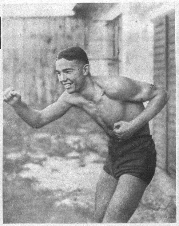 Henryk Chmielewski, bokserski mistrz Europy w wadze średniej